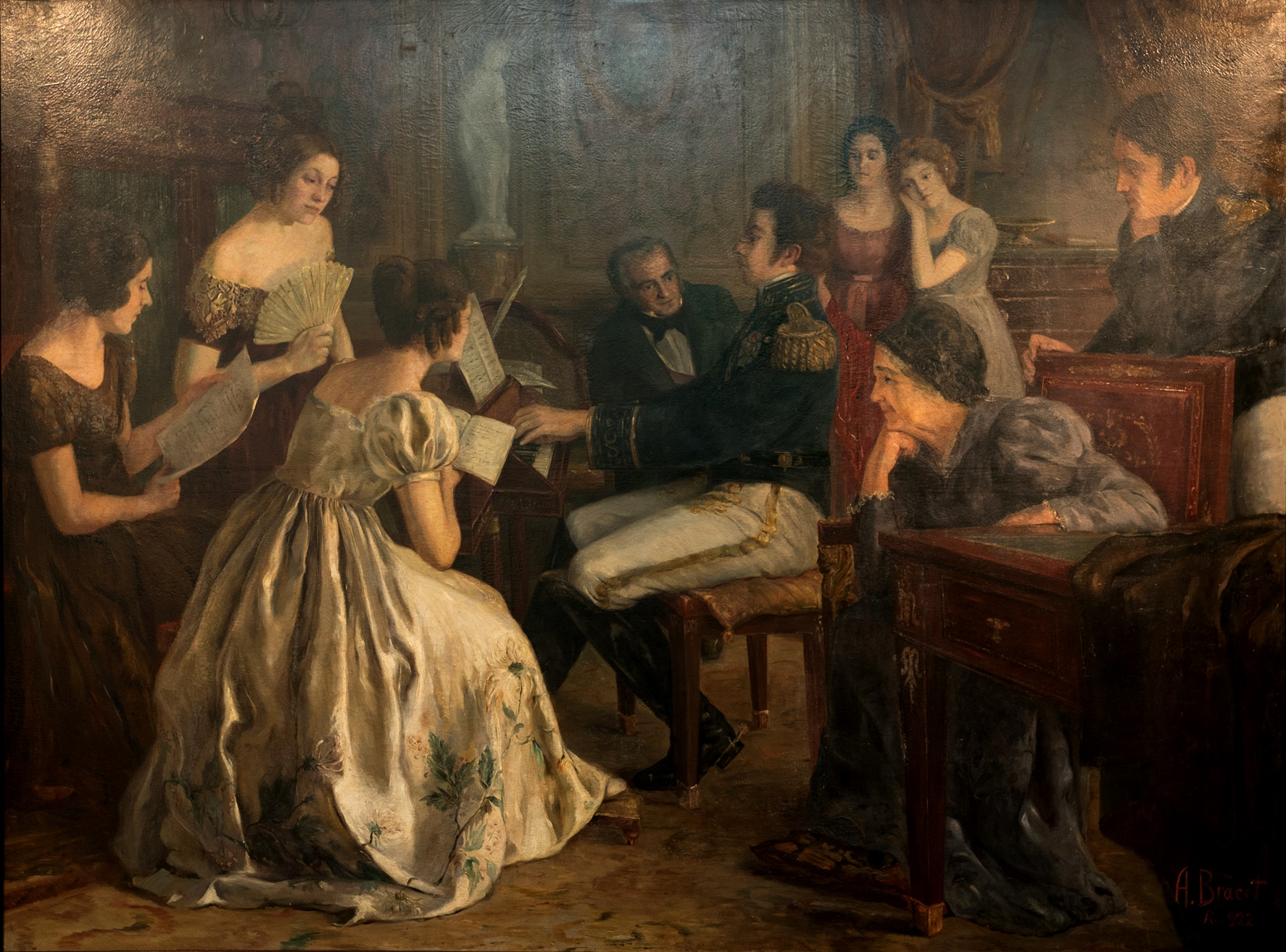 O Imperador dom Pedro I do Brasil compondo o Hino da Independência em 1822.